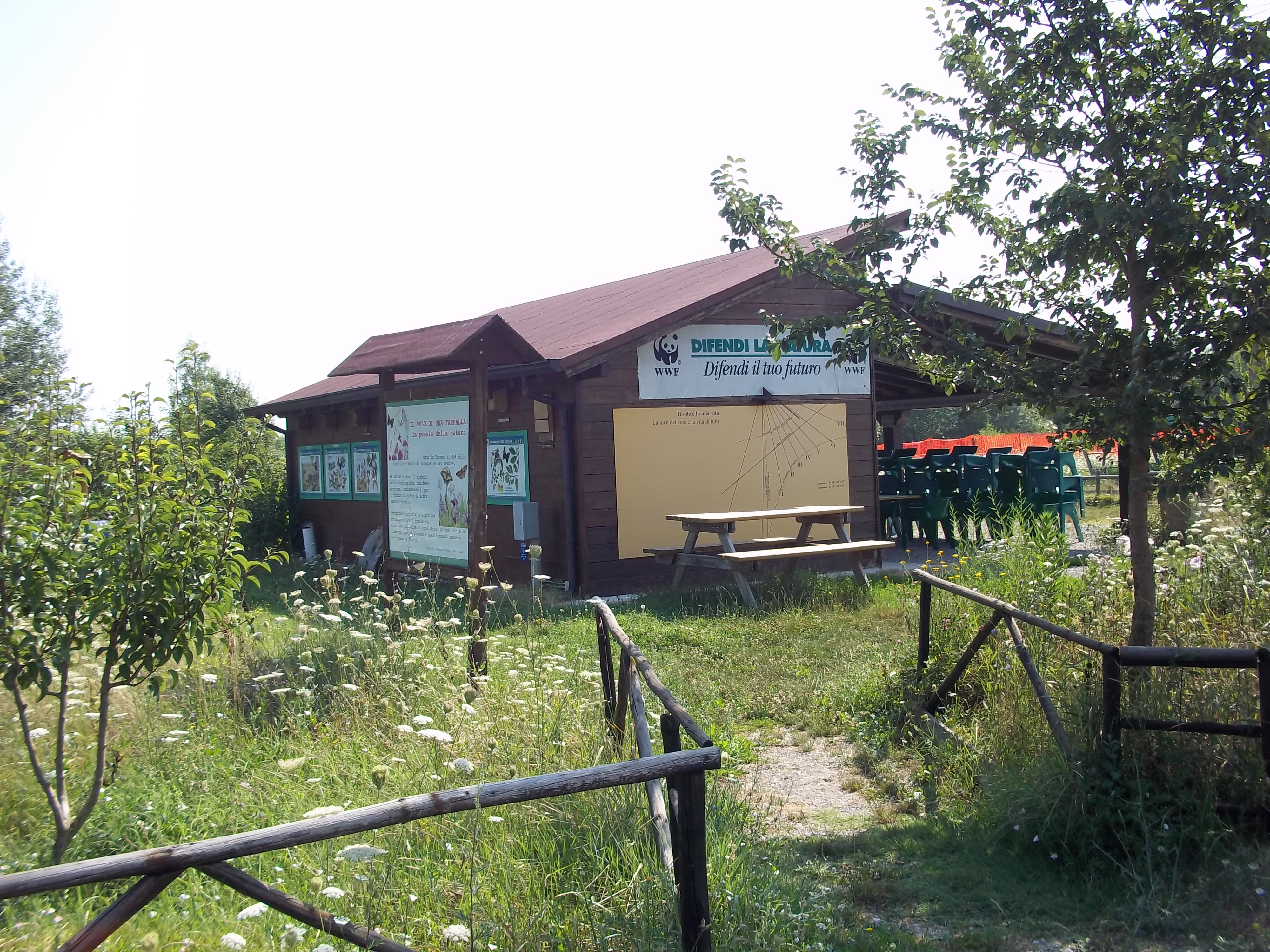 punto informativo di accoglienza, oasi WWF "La Francesa", Fossoli di Carpi (MO) This is a photo of a monument which is part of cultural heritage of Italy.